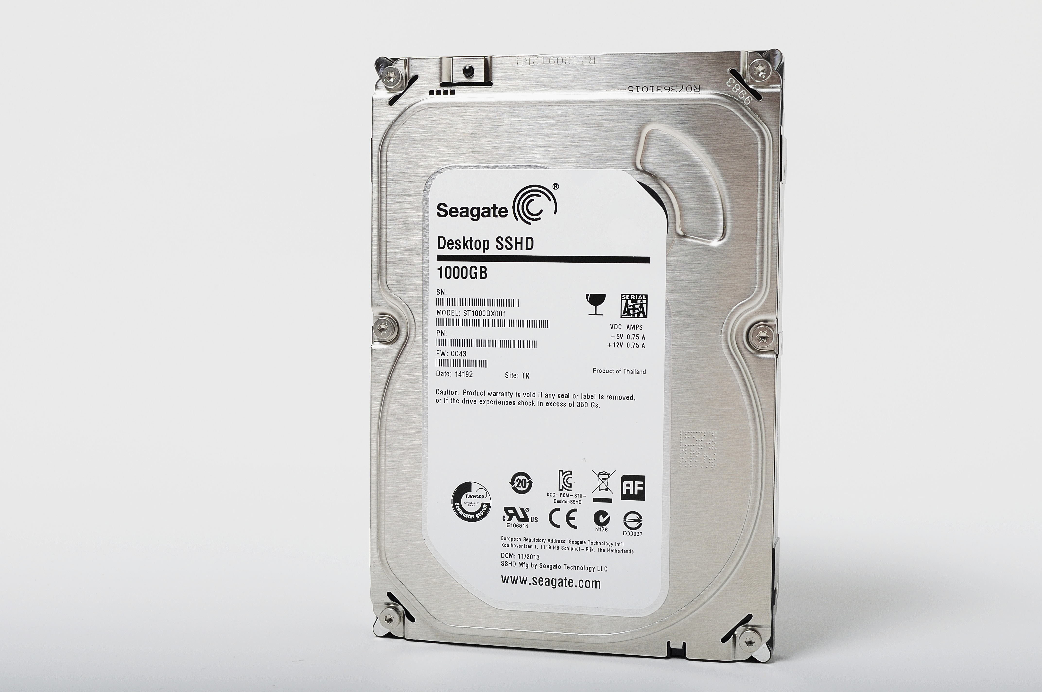 希捷科技SATA混合式硬碟機ST1000DX001正面。